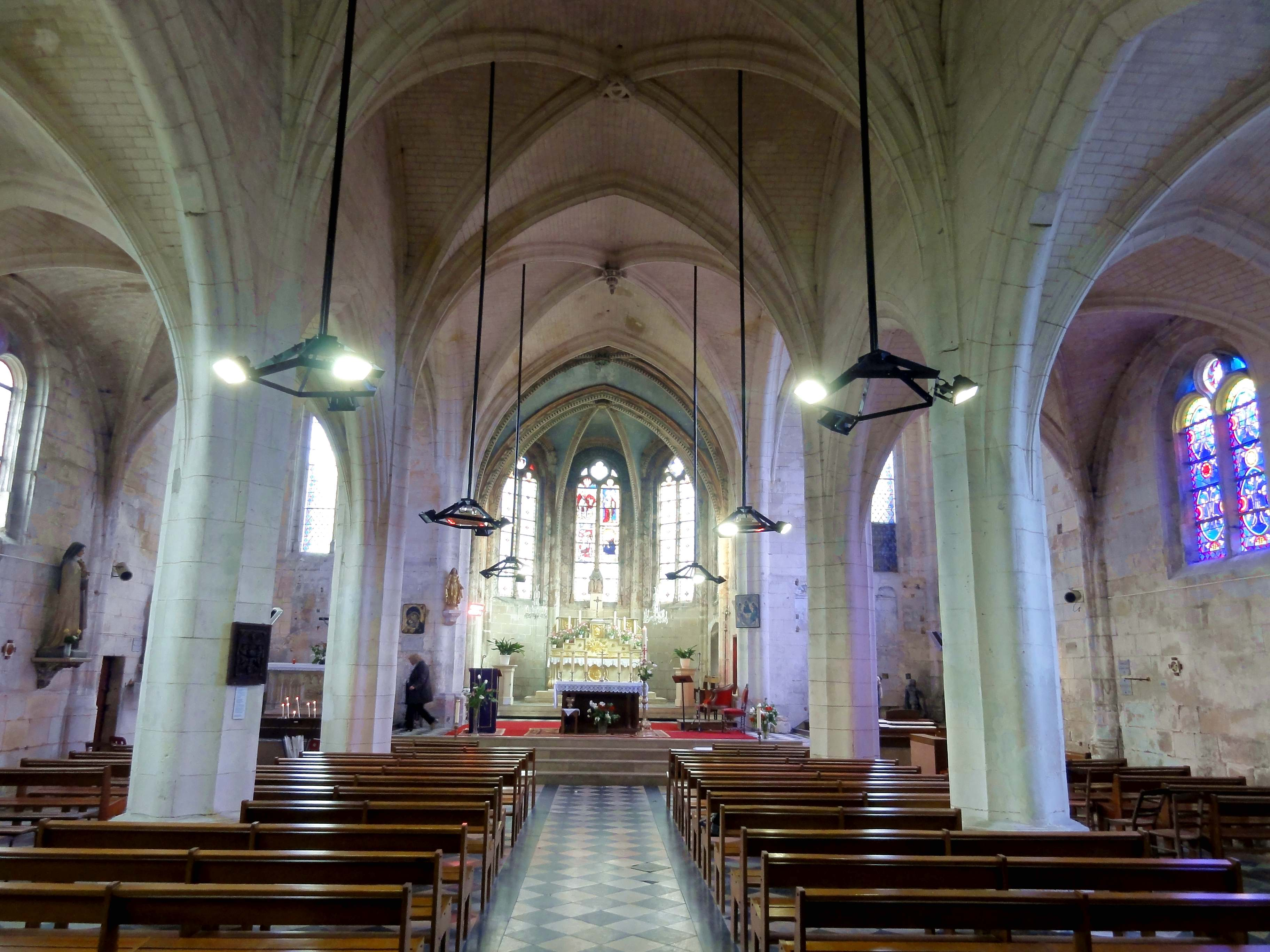 Intérieur de l'église (voir titre).